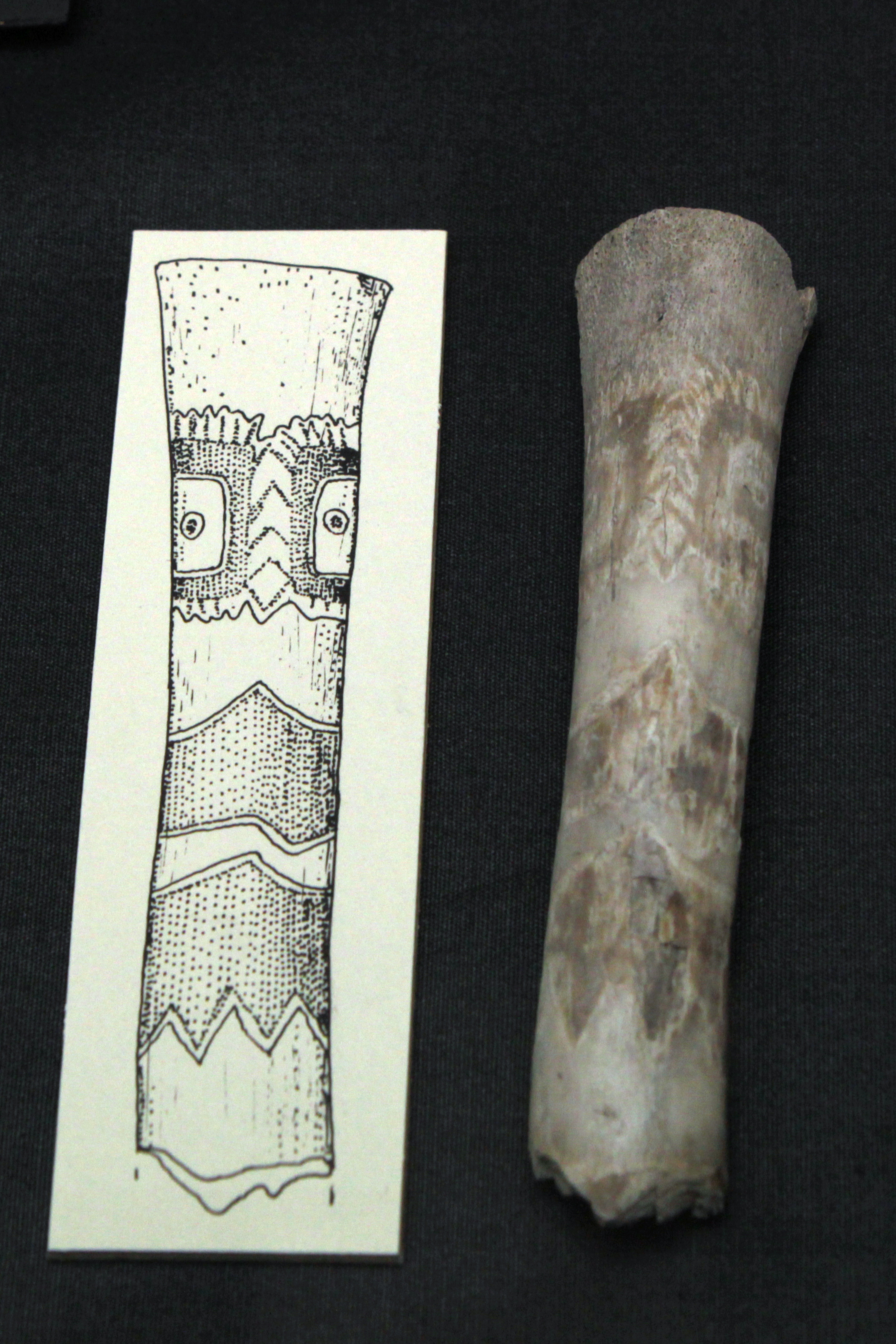 Ídolo oculado eneolítico de Ereta del Pedregal. Depositada en el Museo de Prehistoria de Valencia, Comunidad valenciana, España.